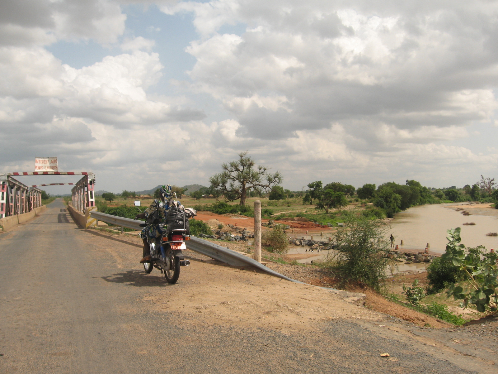 Photo d'un pont sur la route entre Moutourwa et Maroua dans l'extrème nord du Cammeroun.